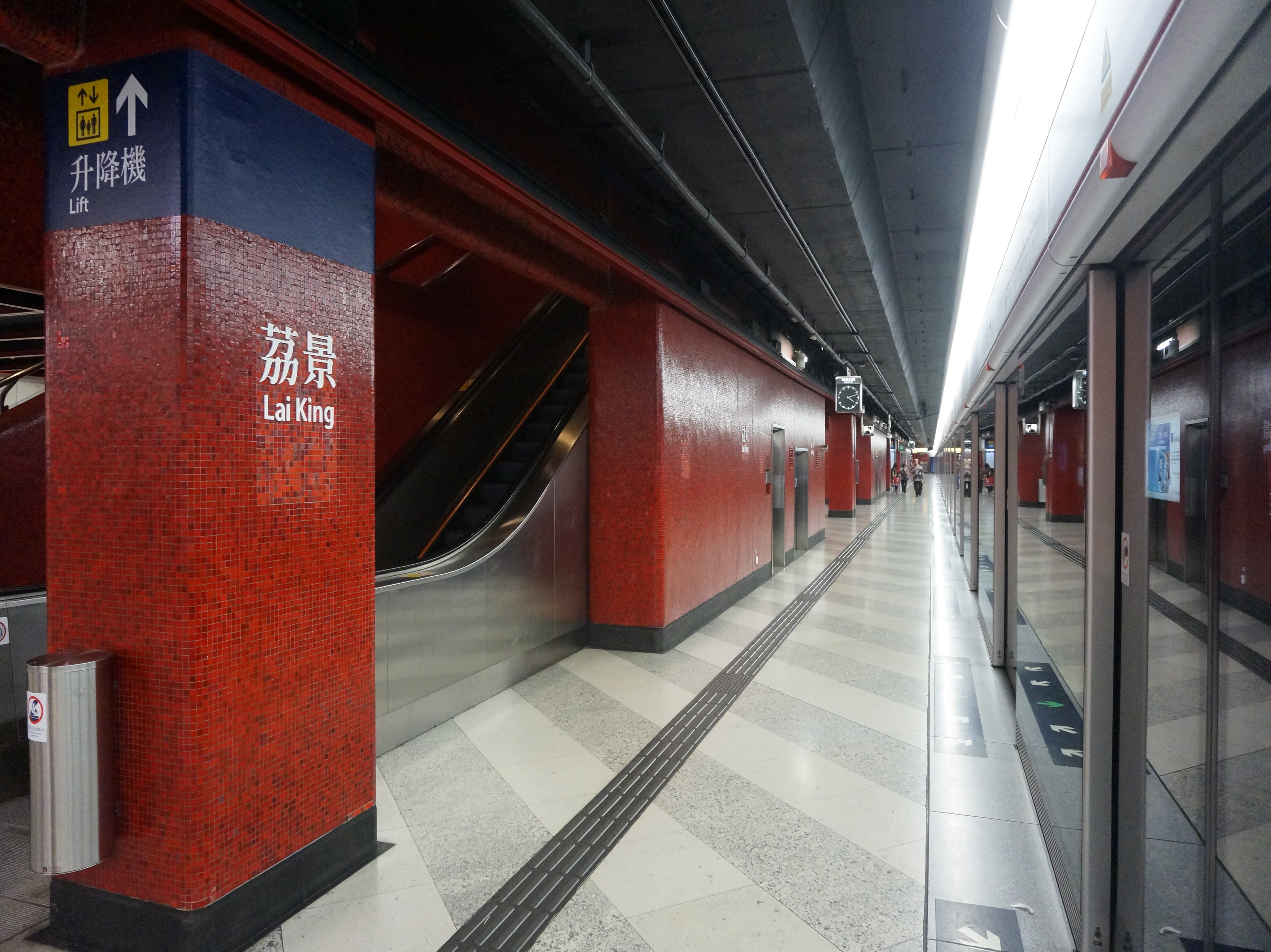 港鐵荔景站月台